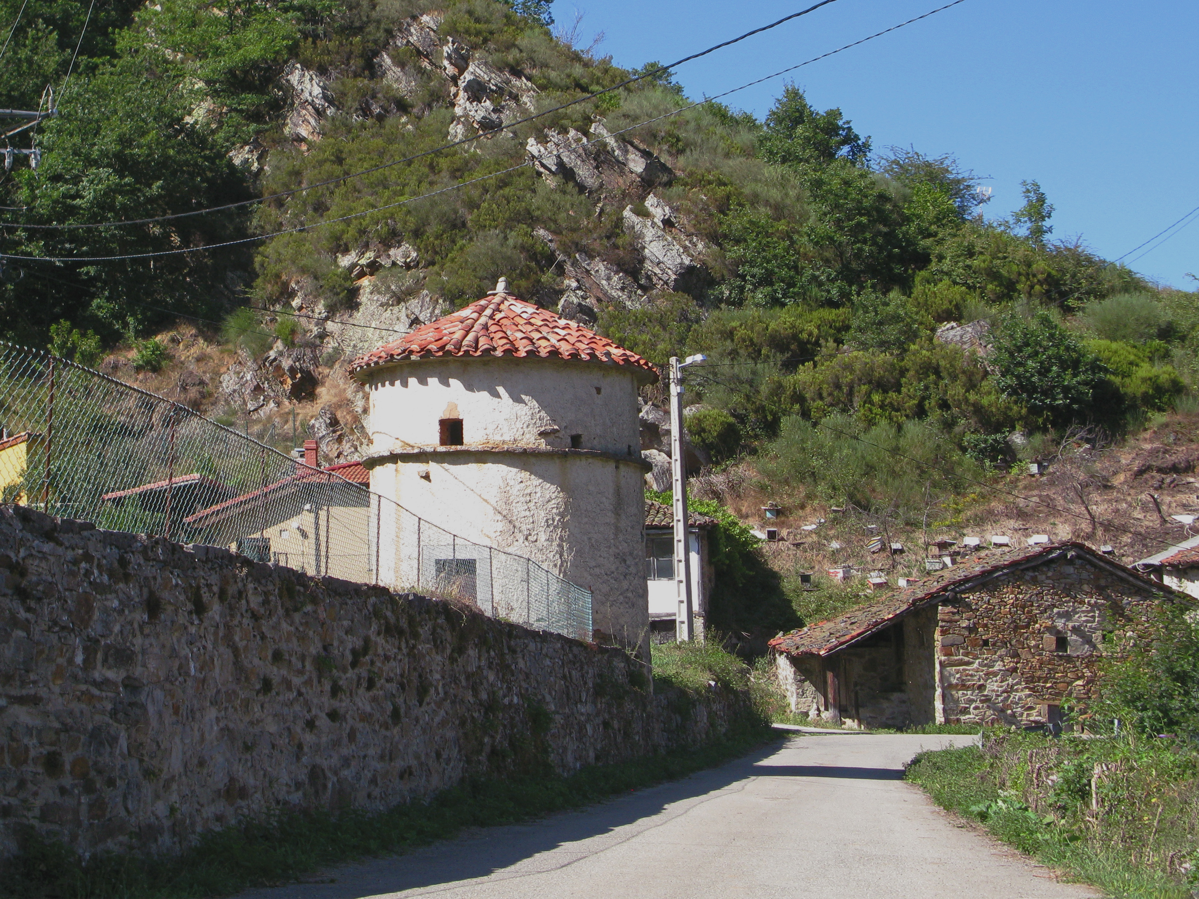 Palomar, Lindes, Asturias, España.